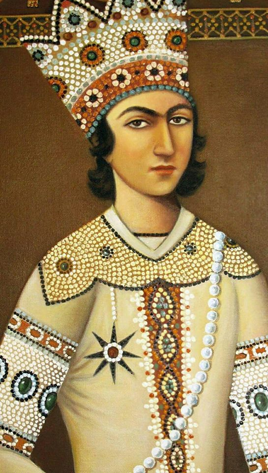 عبدالله میرزا دارا پسر فتحعلی شاه قاجار